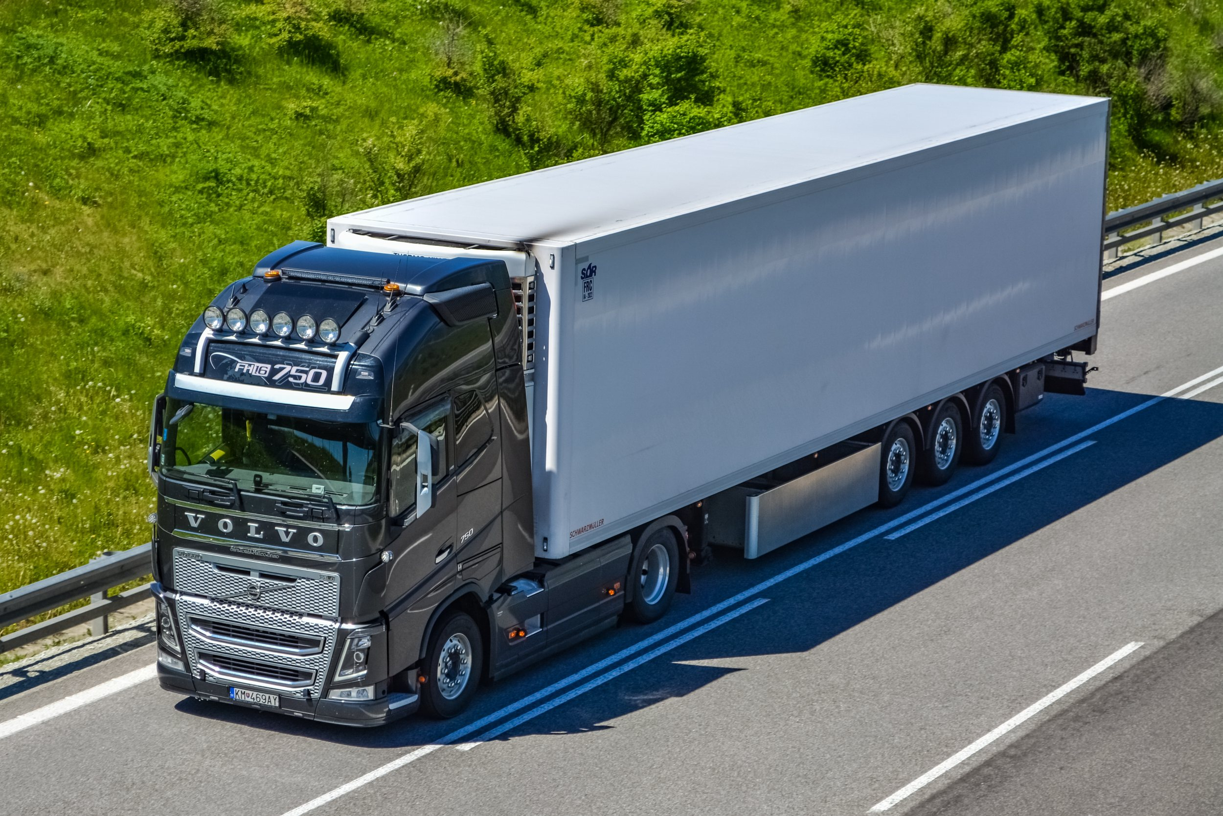 Ťahač návesov Volvo FH16 750 Globetrotter XL (2013)